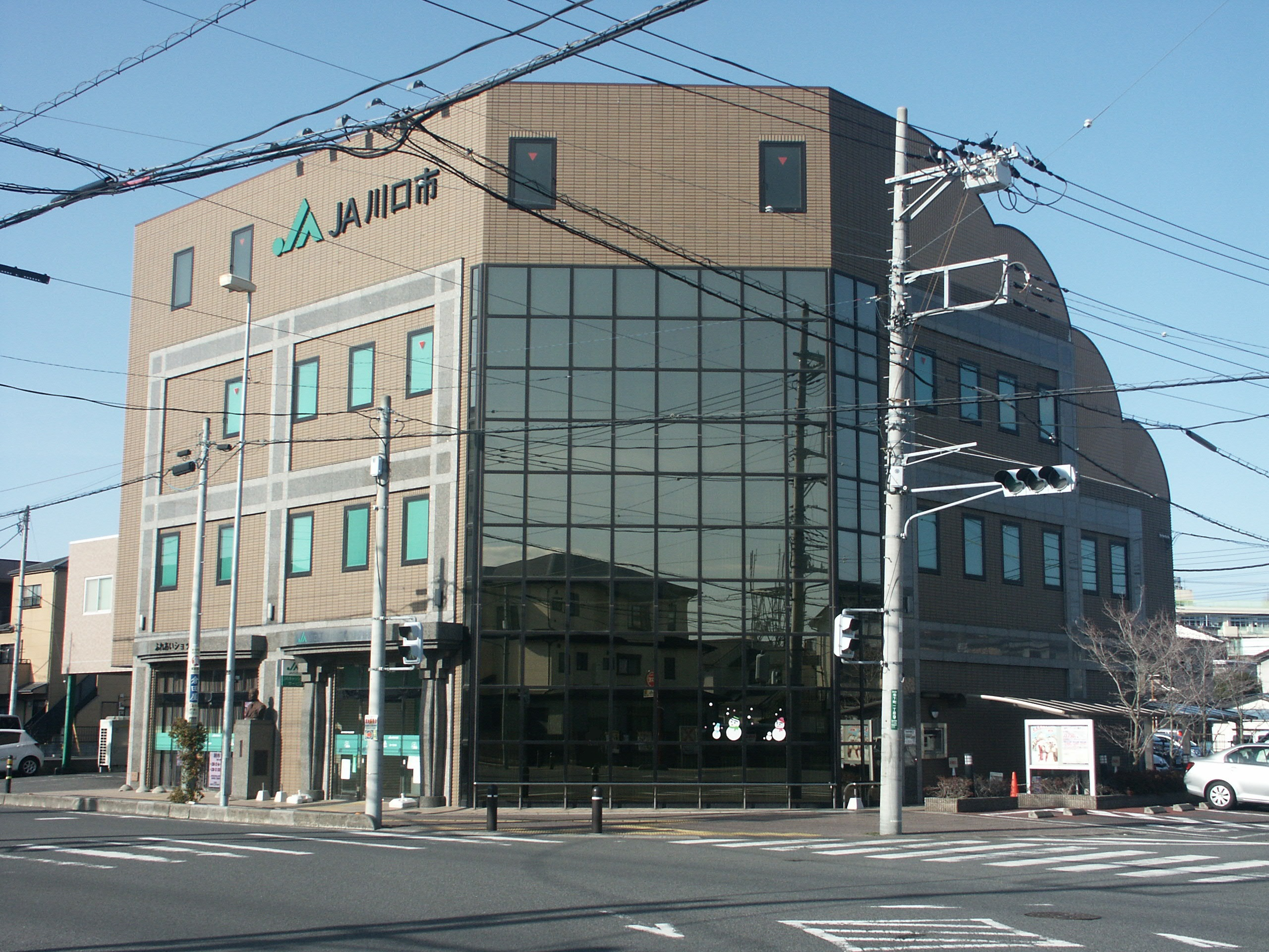 川口市農業協同組合本店（建物と接する交差点角から撮影）